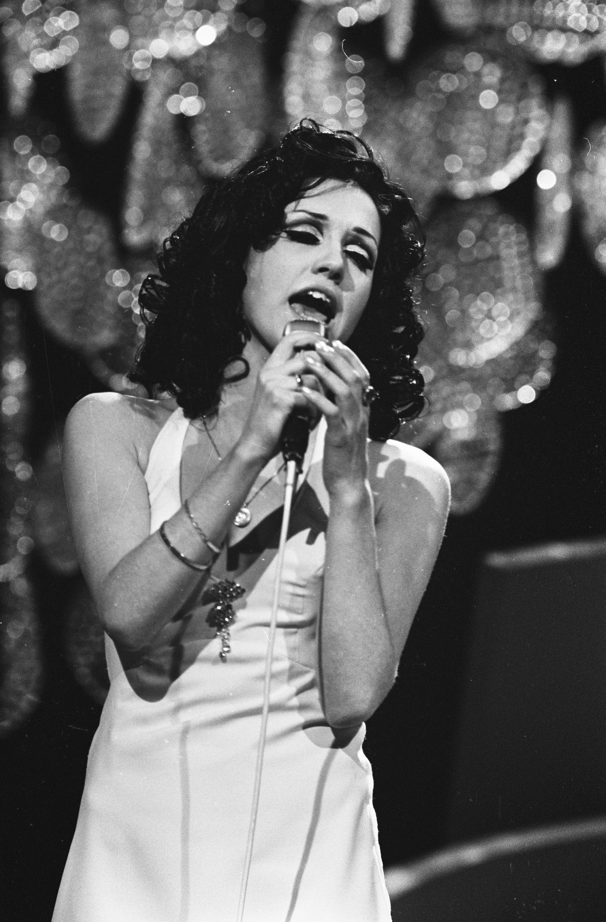 Collectie / Archief : Fotocollectie Anefo Reportage / Serie : [ onbekend ] Beschrijving : Nationale finale van het Eurovisie Songfestival in Scheveningen Patricia Paay Datum : 26 februari 1969 Locatie : Scheveningen, Zuid-Holland Trefwoorden : SONGFESTIVALS, finales Persoonsnaam : Paay, Patricia Fotograaf : Koch, Eric / Anefo Auteursrechthebbende : Nationaal Archief Materiaalsoort : Negatief (zwart/wit) Nummer archiefinventaris : bekijk toegang 2.24.01.05 Bestanddeelnummer : 922-1418